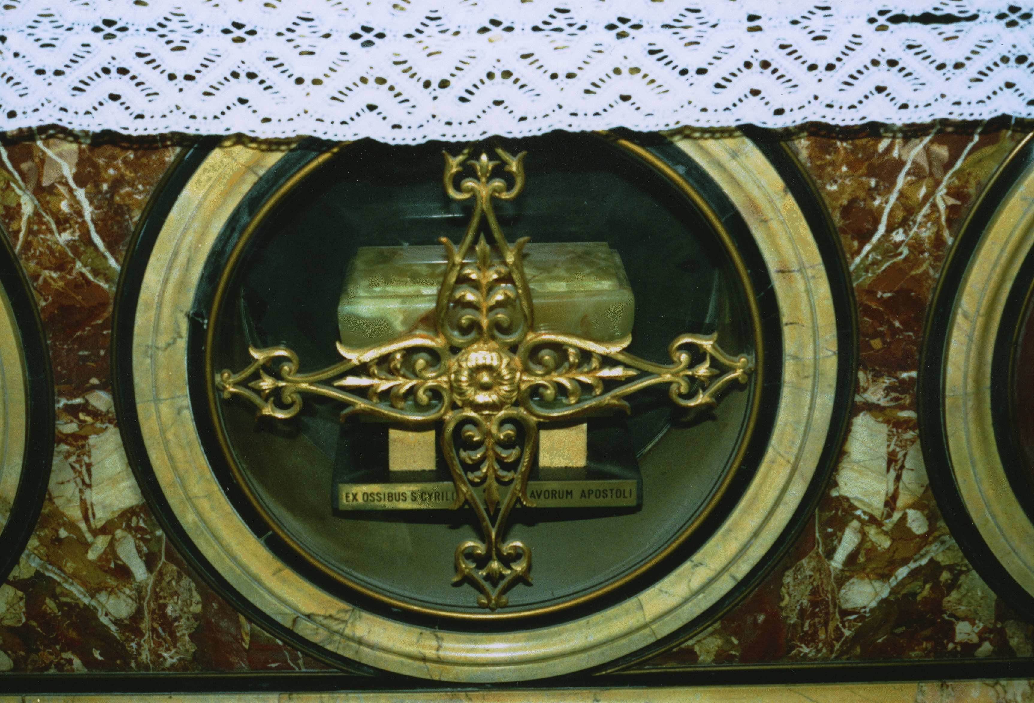 Ostatky sv. Cyrila Konštantína Filozofa v Bazilike sv. Klimenta v Ríme, foto z r. 1989. Photo taken by Jozafát Vladimír Timkovič, OSBM